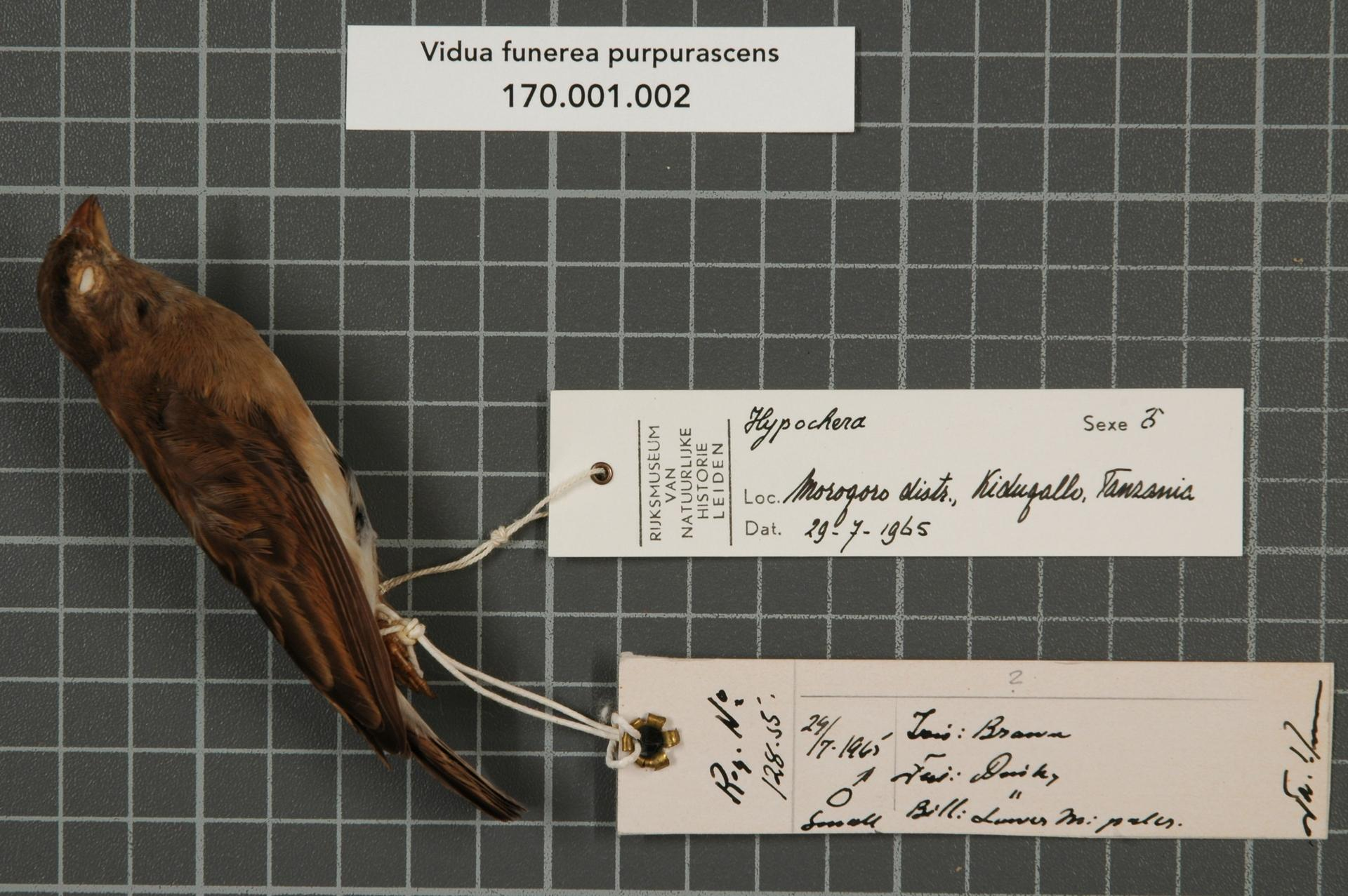 Vidua funerea purpurascens (Reichenow, 1883)